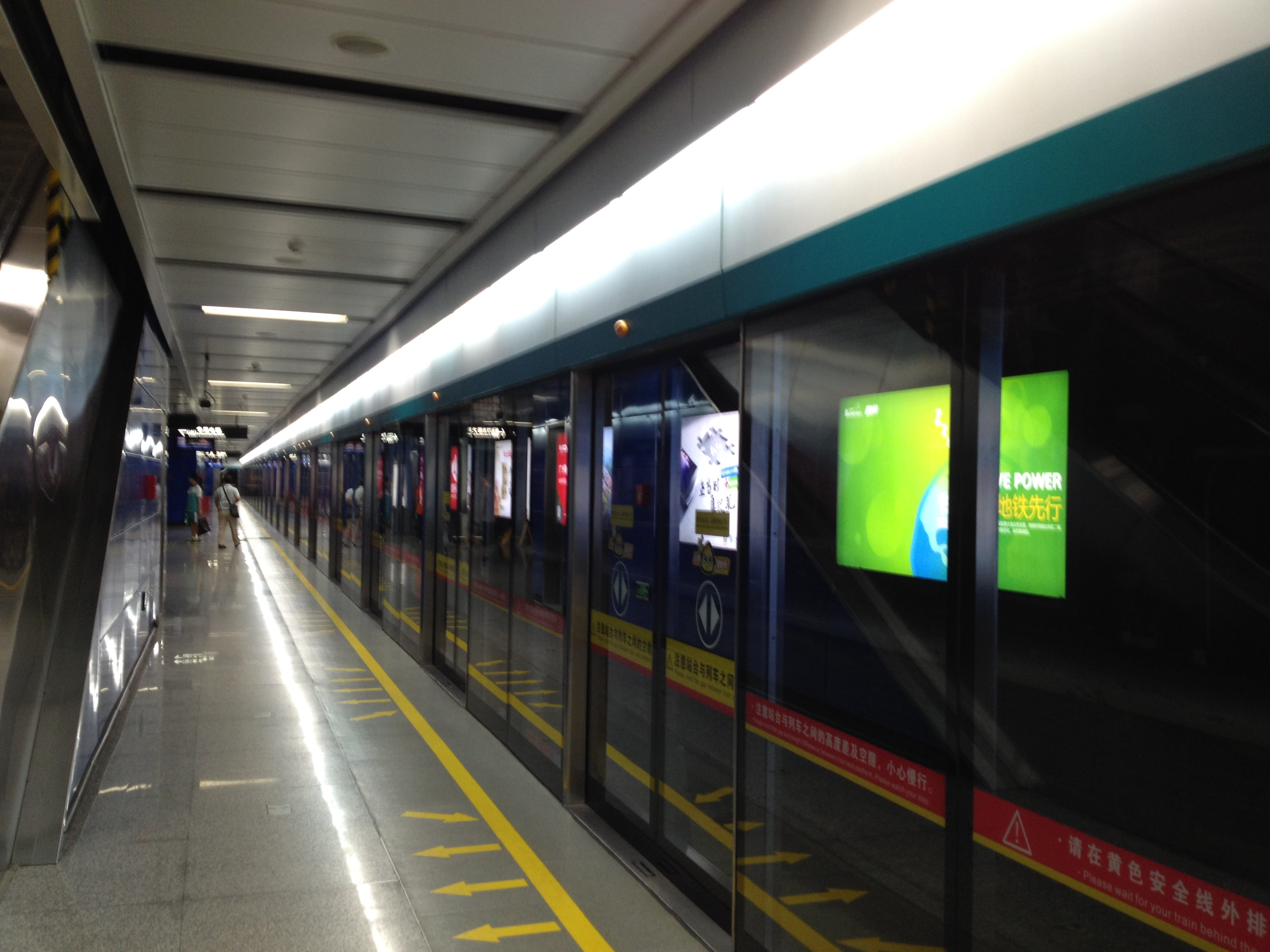 广州地铁凤凰新村站月台（白云湖方向）